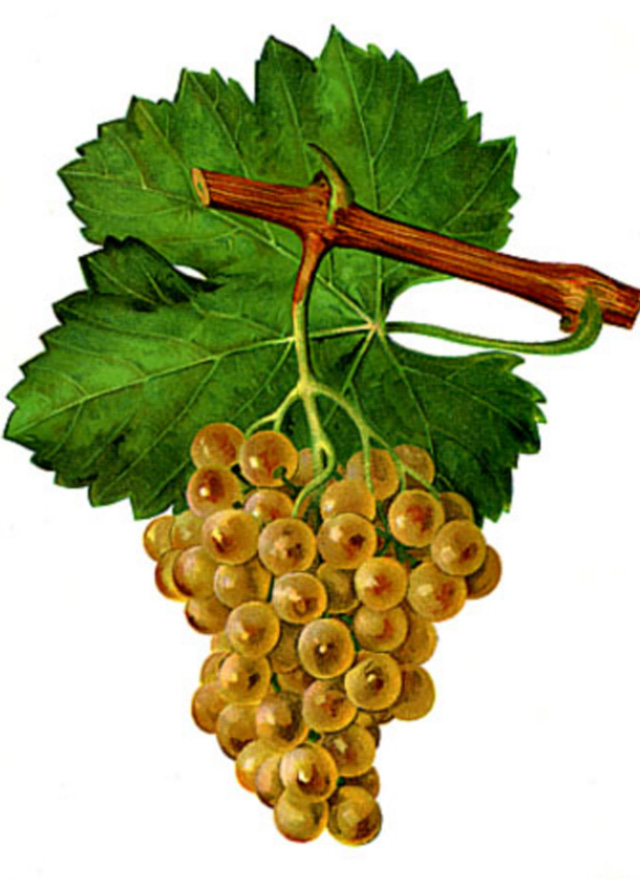 Grappe de Gros Semillon par Viala et Vermorel